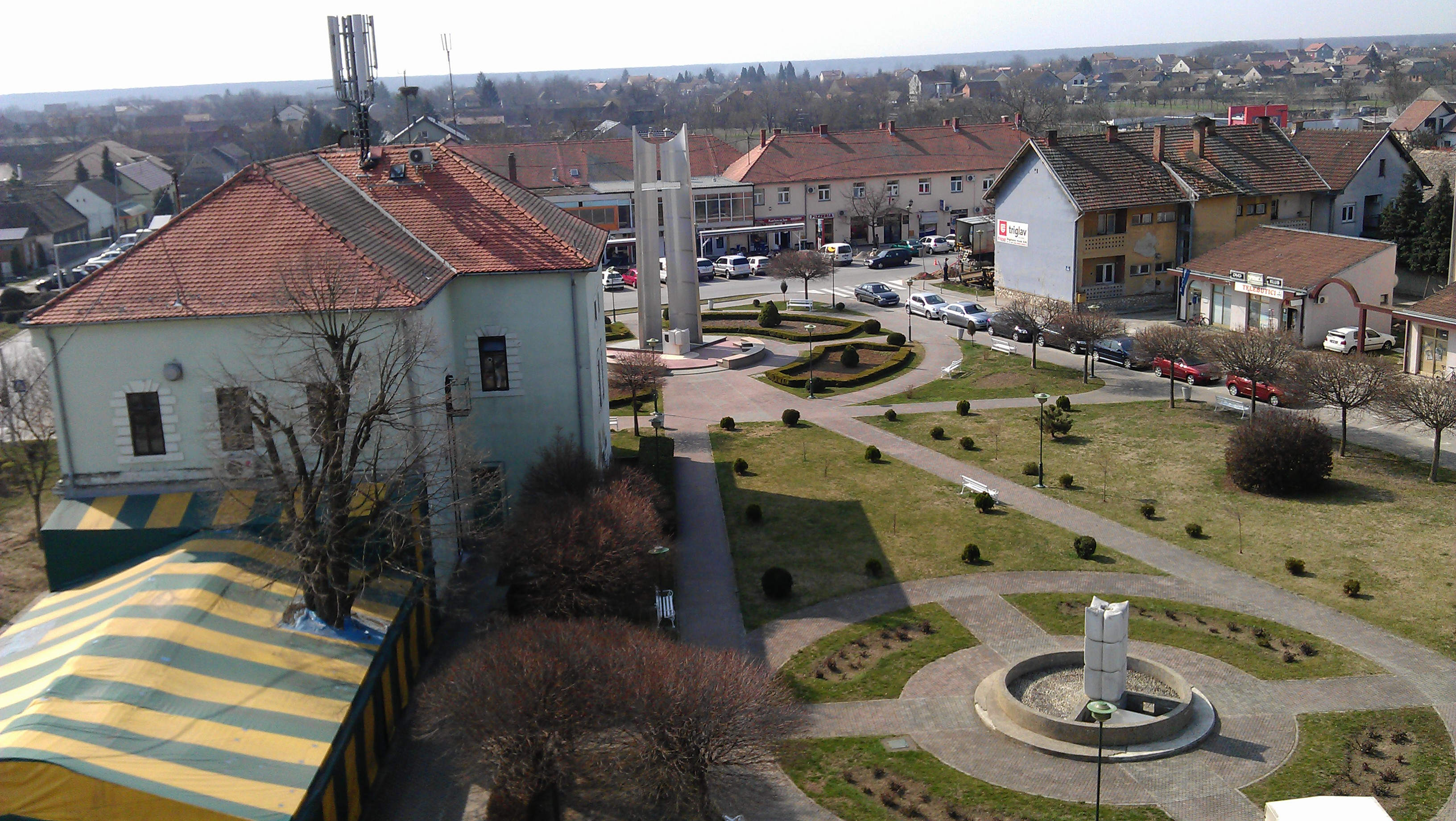 Otok